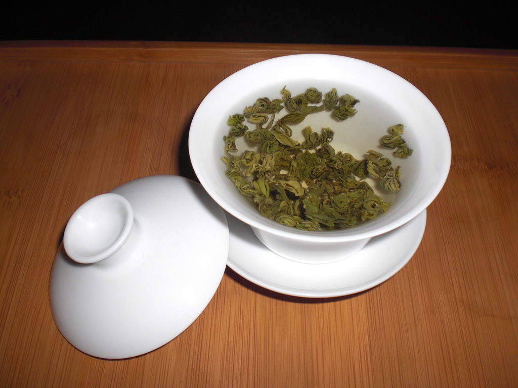 Thé vert infusant dans un Zhong